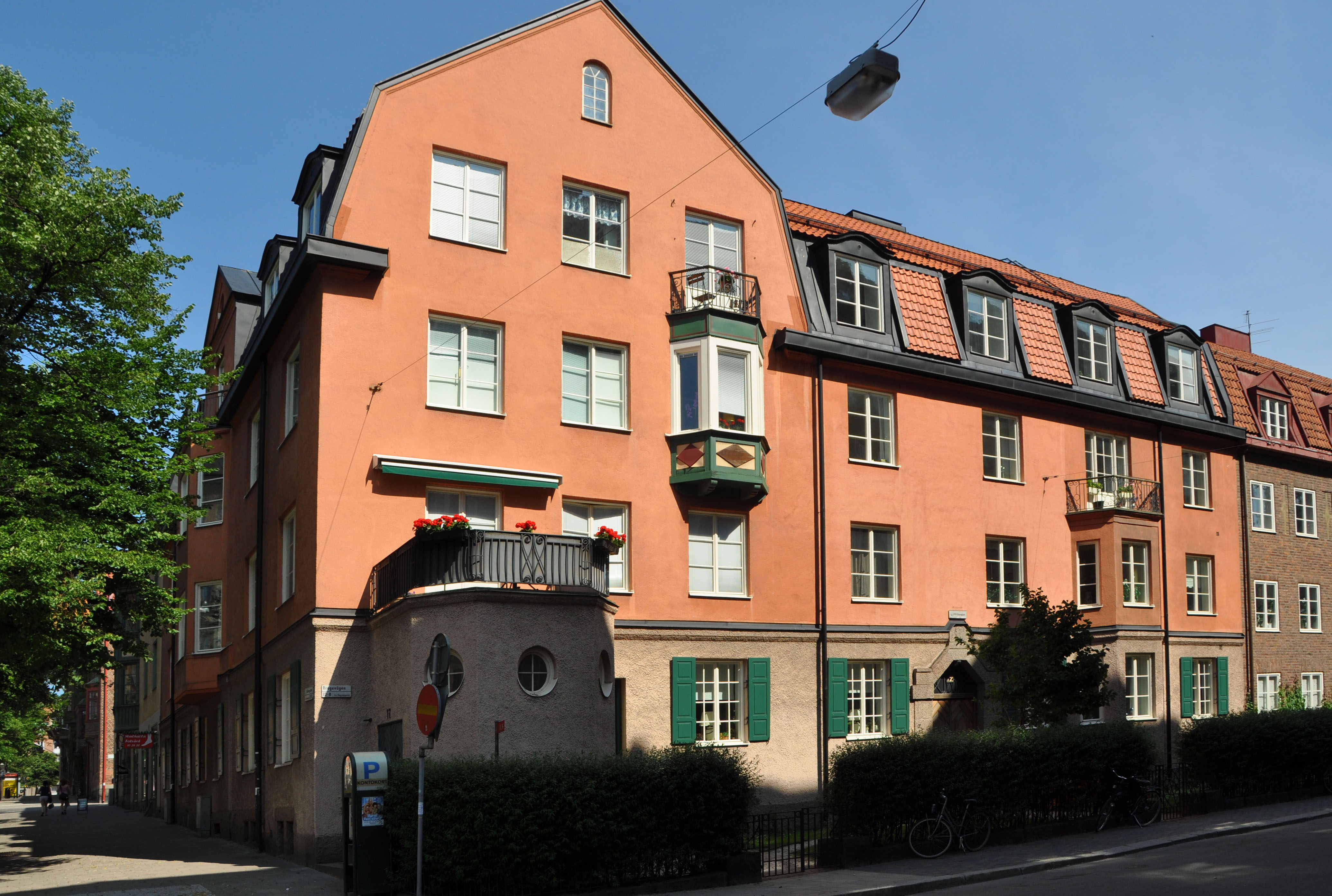 Bragevägen 12/Odengatan 17 (Flugsnapparen 8): Byggnadsår 1915-17, arkitekt Hjalmar Westerlund, byggherre P Egelnoff, byggmästare G Lundberg. . Raoul Wallenbergs sista boplats i Sverige. The scientist Lise Meitner lived at this address for most of her years while in Sweden.